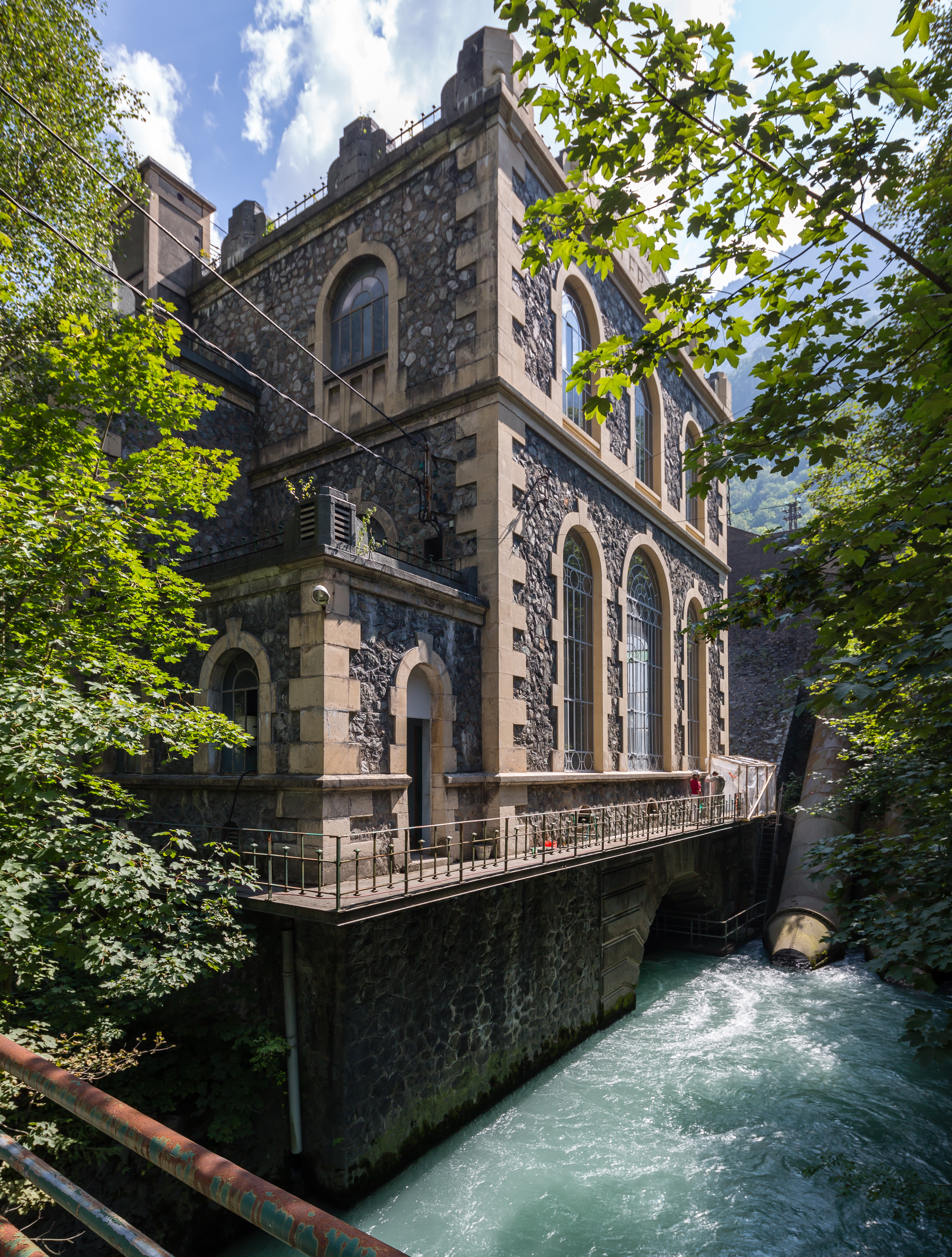 Centrale hydroélectrique des Vernes à Livet-et-Gavet (France).